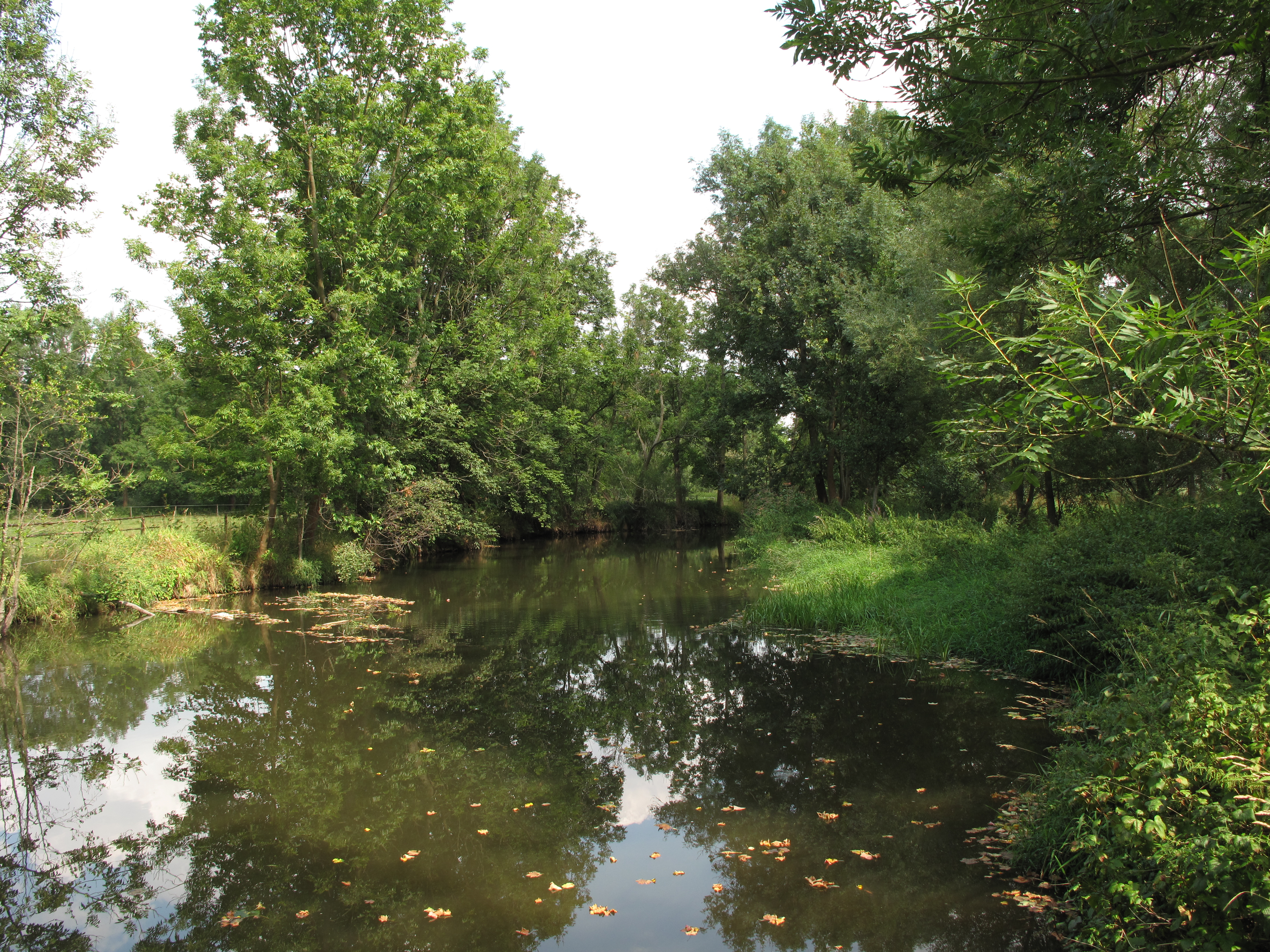 Přírodní památka Lužany. Okres Plzeň-jih, Česká republika.